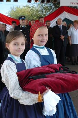 Lányok Nyírmada városkulcsával a várossá avatás alkalmaával